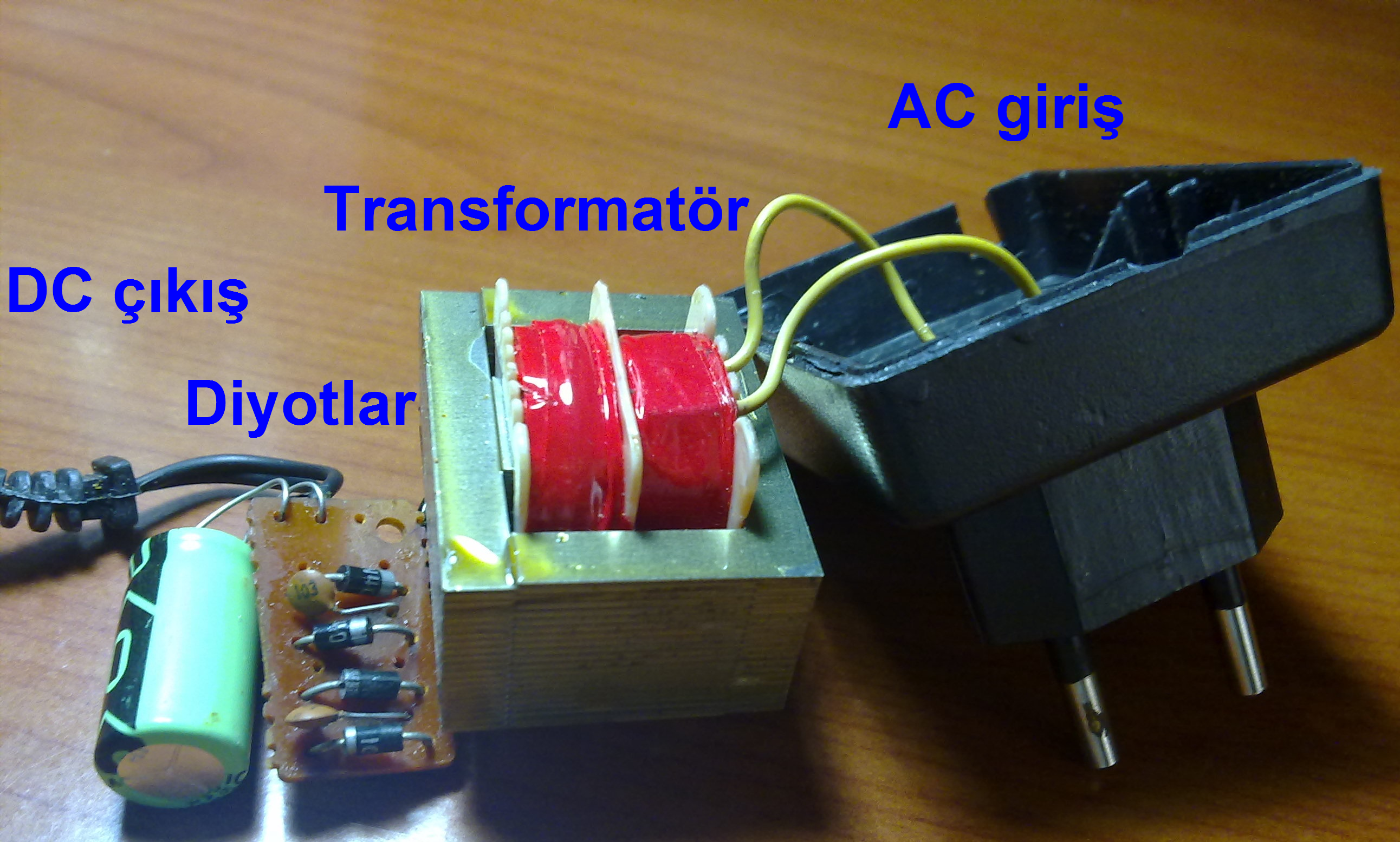 Evlerde kullanılan AC adptörü